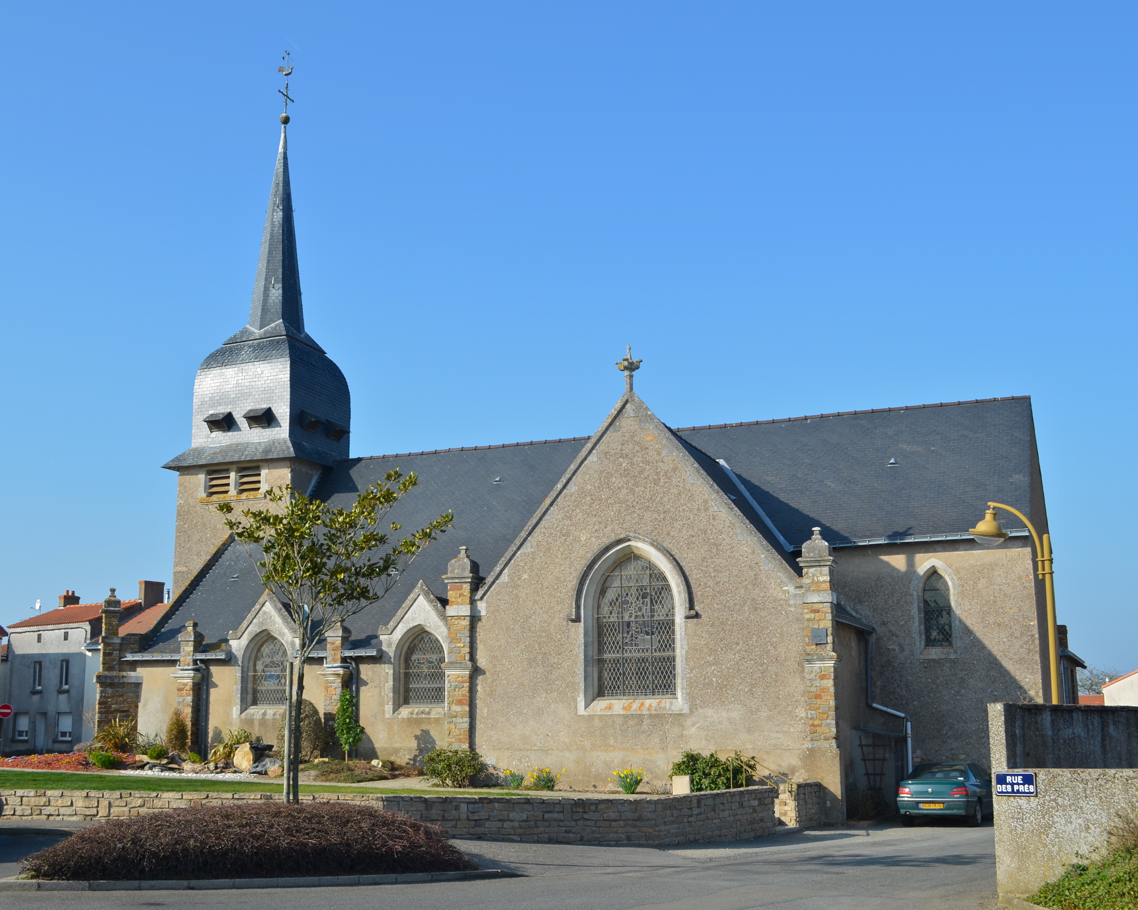 Eglise Saint-Martin - Corsept, Loire-Atlantique